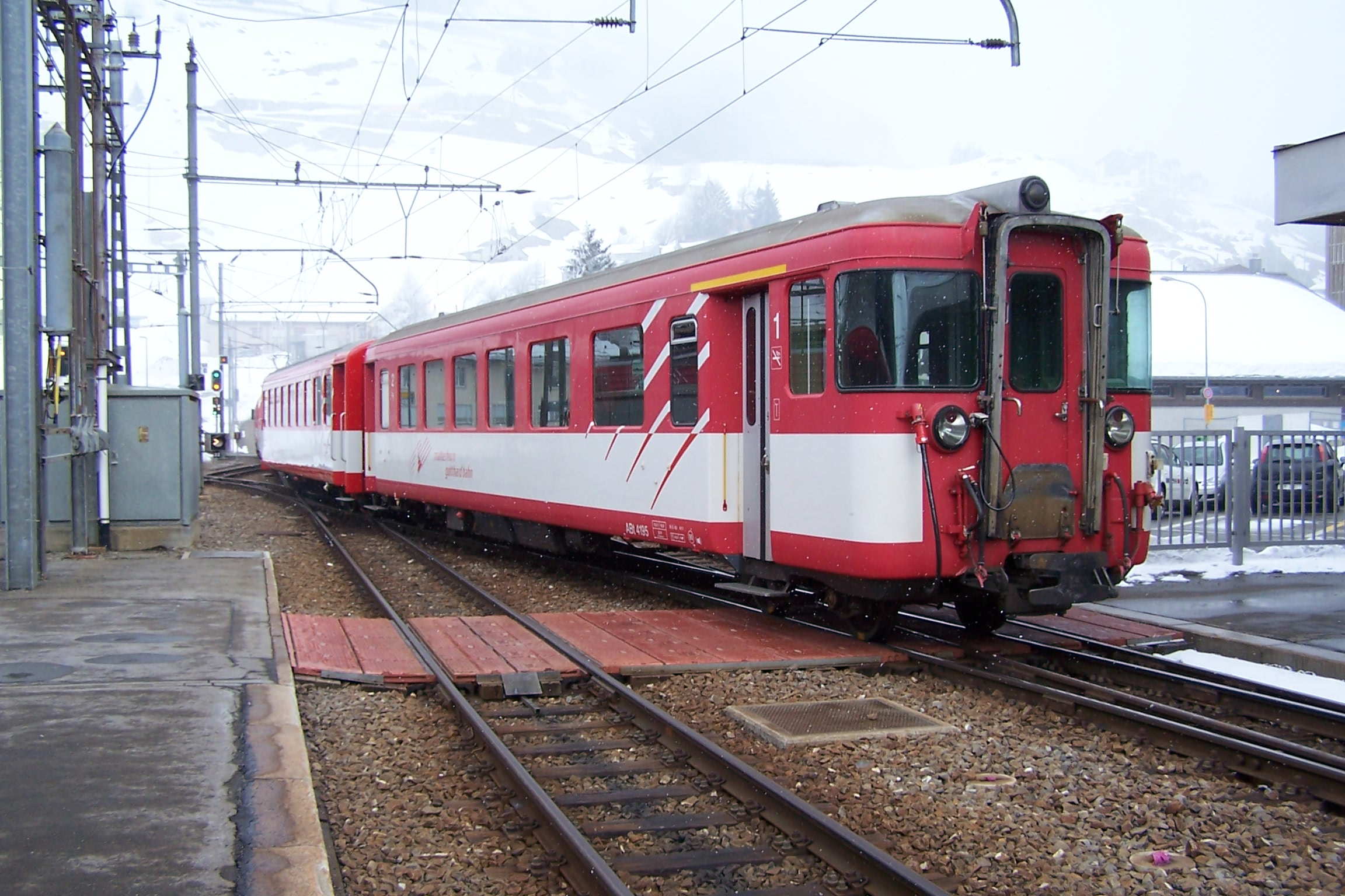 Der ehemalige Steuerwagen ABt 4195 der MGB in Andermatt. Führerstandsausrüstung, Schienenräumer und Steuerleitung sind ausgebaut, der Wagen ist nur noch als Anhängewagen im Einsatz